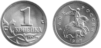 1 копейка Банка России